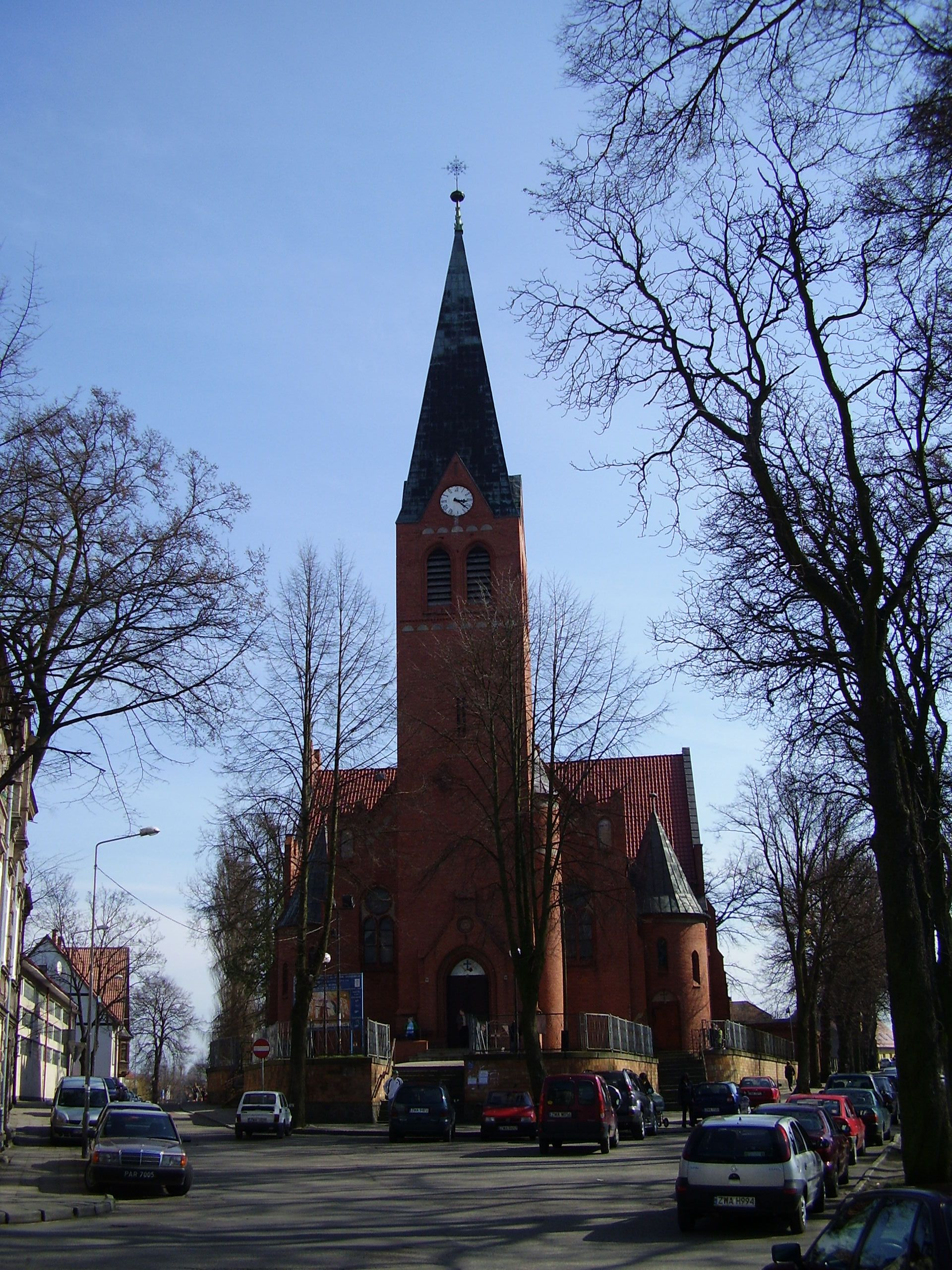 Wałcz, kościół ewangelicki, ob. rzym.-kat. par. p.w. św. Antoniego, 1902-1903